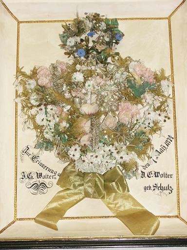 gerahmter Hochzeitsschmuck Hannoversches Wendland